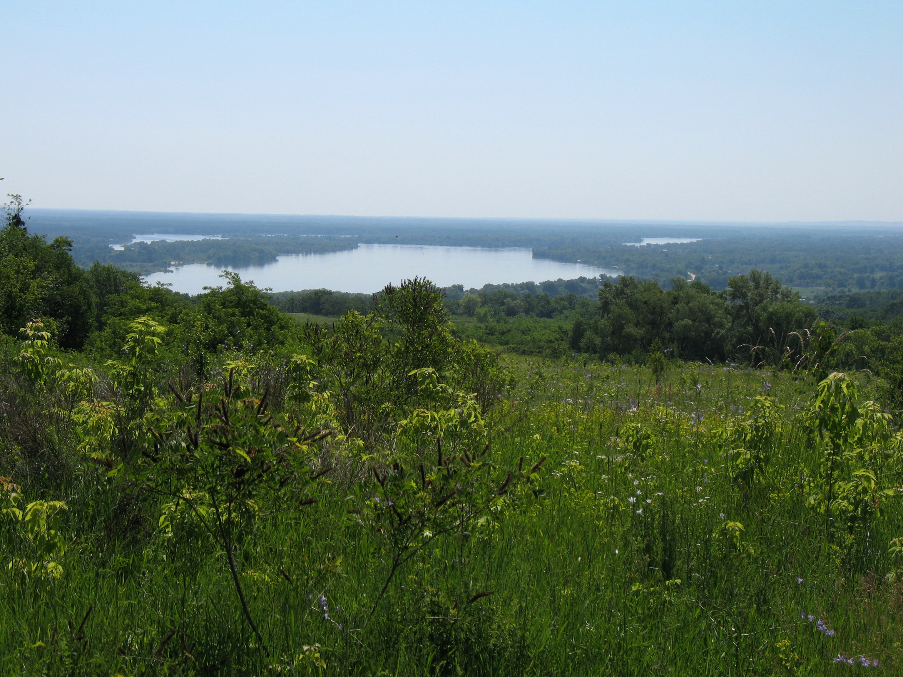 Канівський природний заповідник, м. Канів, Золотоніський район: адмінмежі Бубнівсько-Слобідської сільської ради; Канівський район, адмінмежі Пекарівської, Прохорівської, Хмільнянської, Яблунівської сільських рад